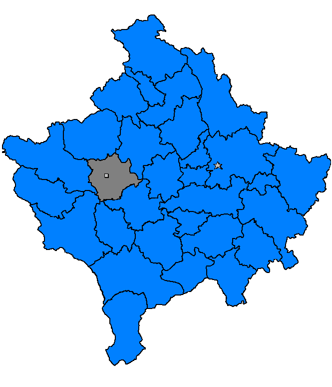 Klinë, Kosovë 2006